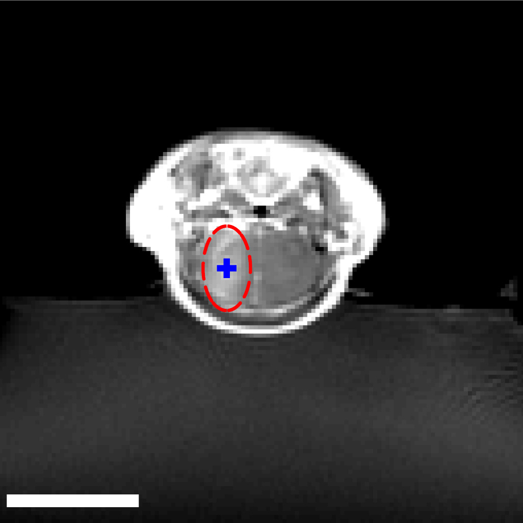 MRT des Schädels einer Maus.